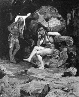 Från Grottesången i Eddan (Edda Saemundar), De nordiska guda- och hjältesångerna av Erik Brate [1]